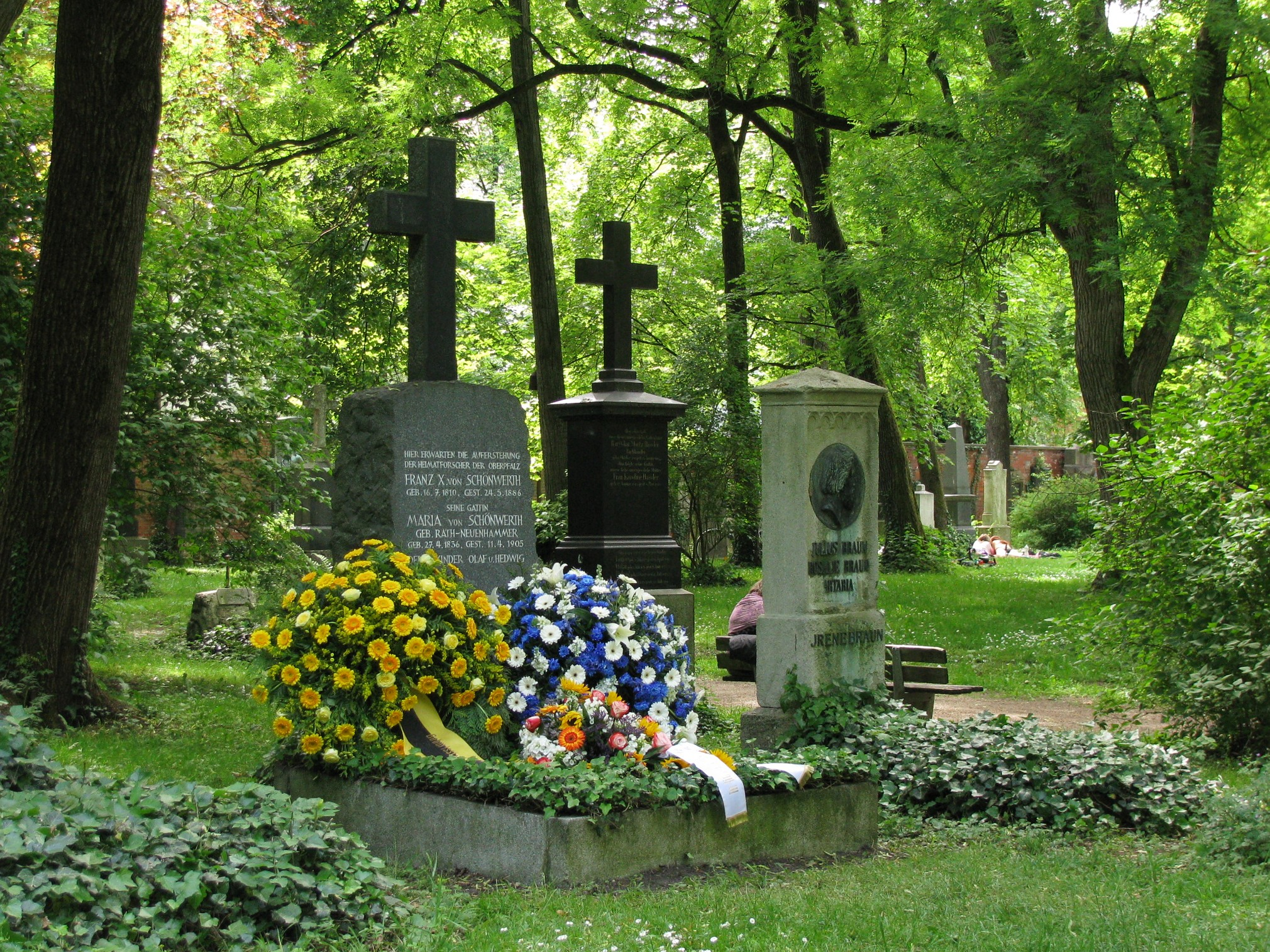 Manchen Verstorbenen wird auch heute noch im Alten Nördlichen Friedhof in München gedacht: Grab von Franz Xaver Schönwerth, geschmückt anlässlich seines 125sten Todestages.